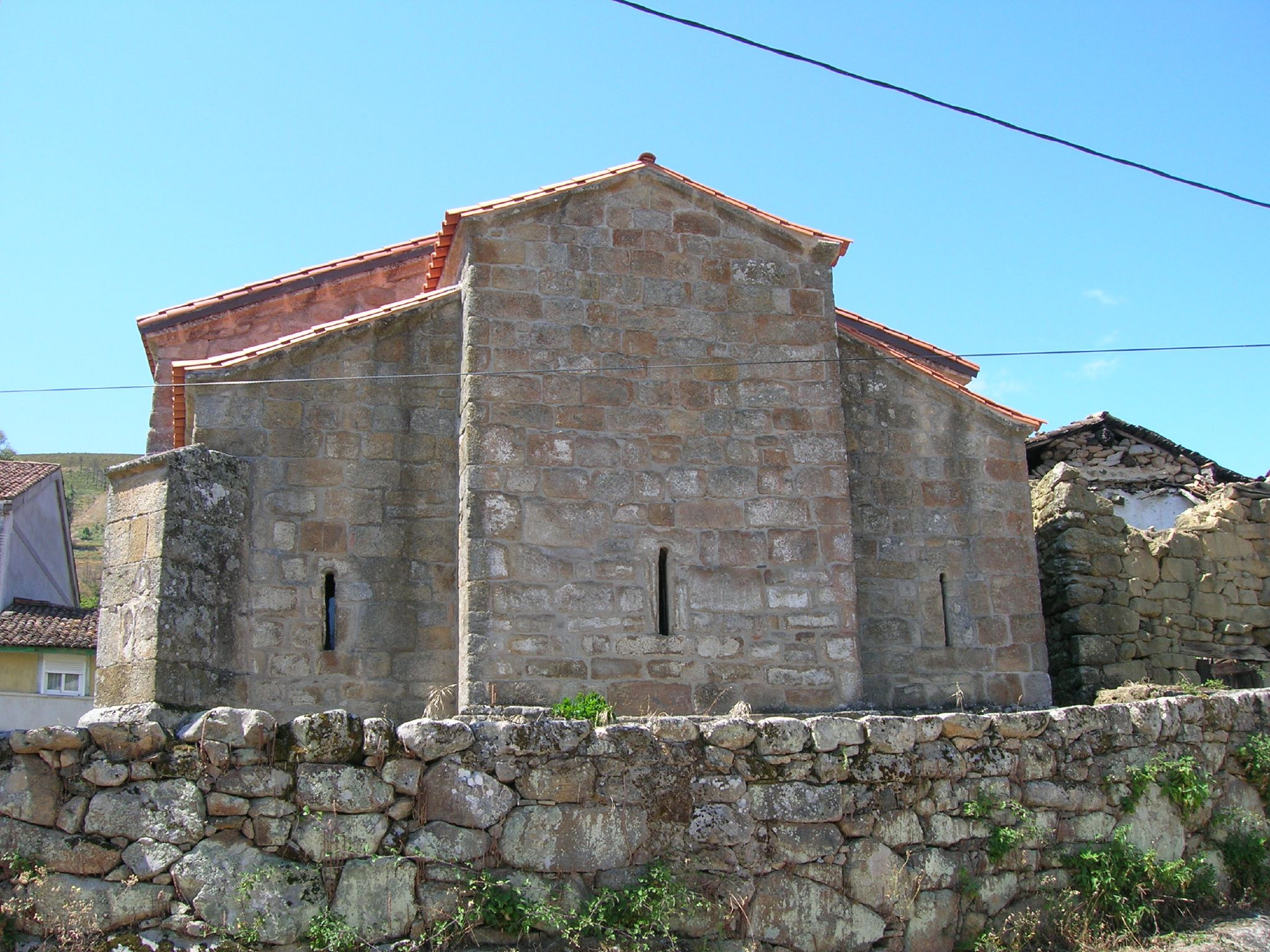 Igrexa prerrománica de Santa María de Mixós - Monterrei - Ourense